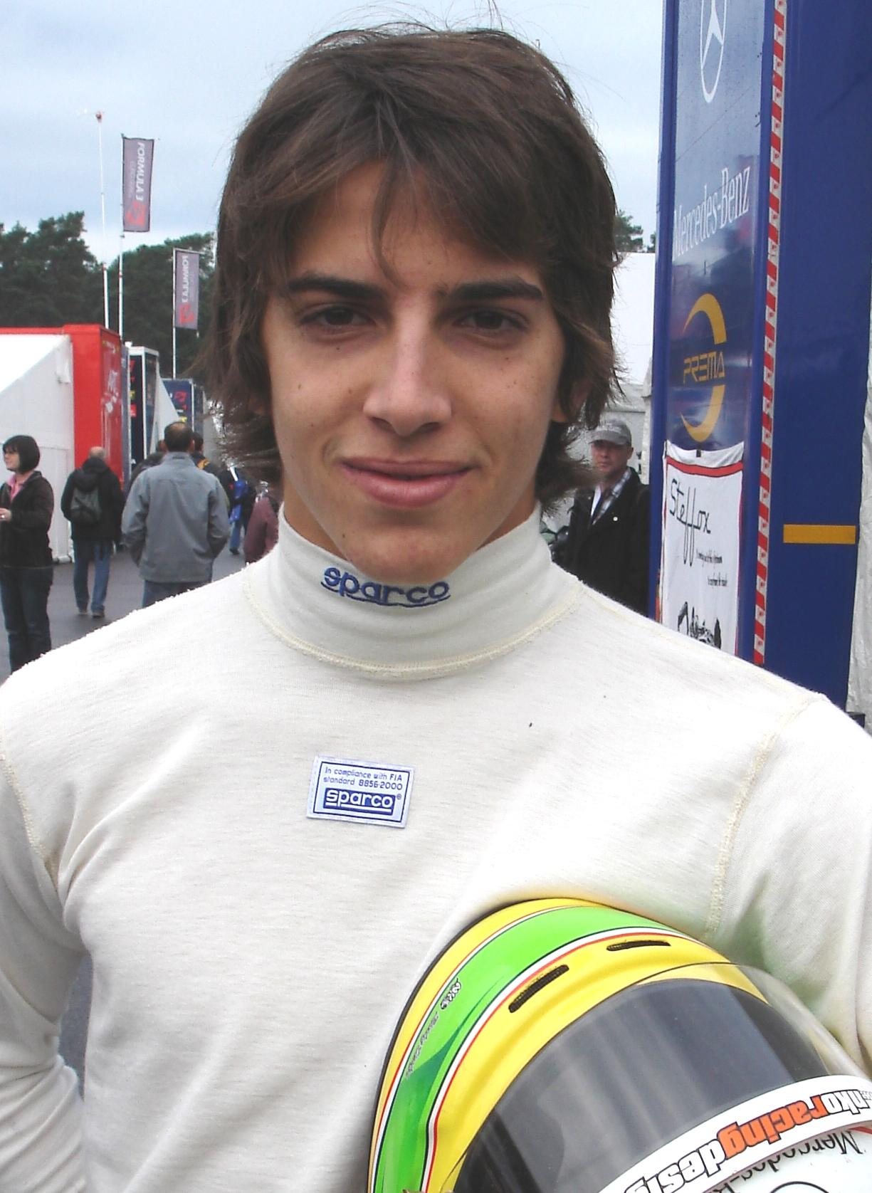 Roberto Merhi, Bild entstanden im Rahmen des DTM-Rennwochenendes auf dem Hockenheimring.